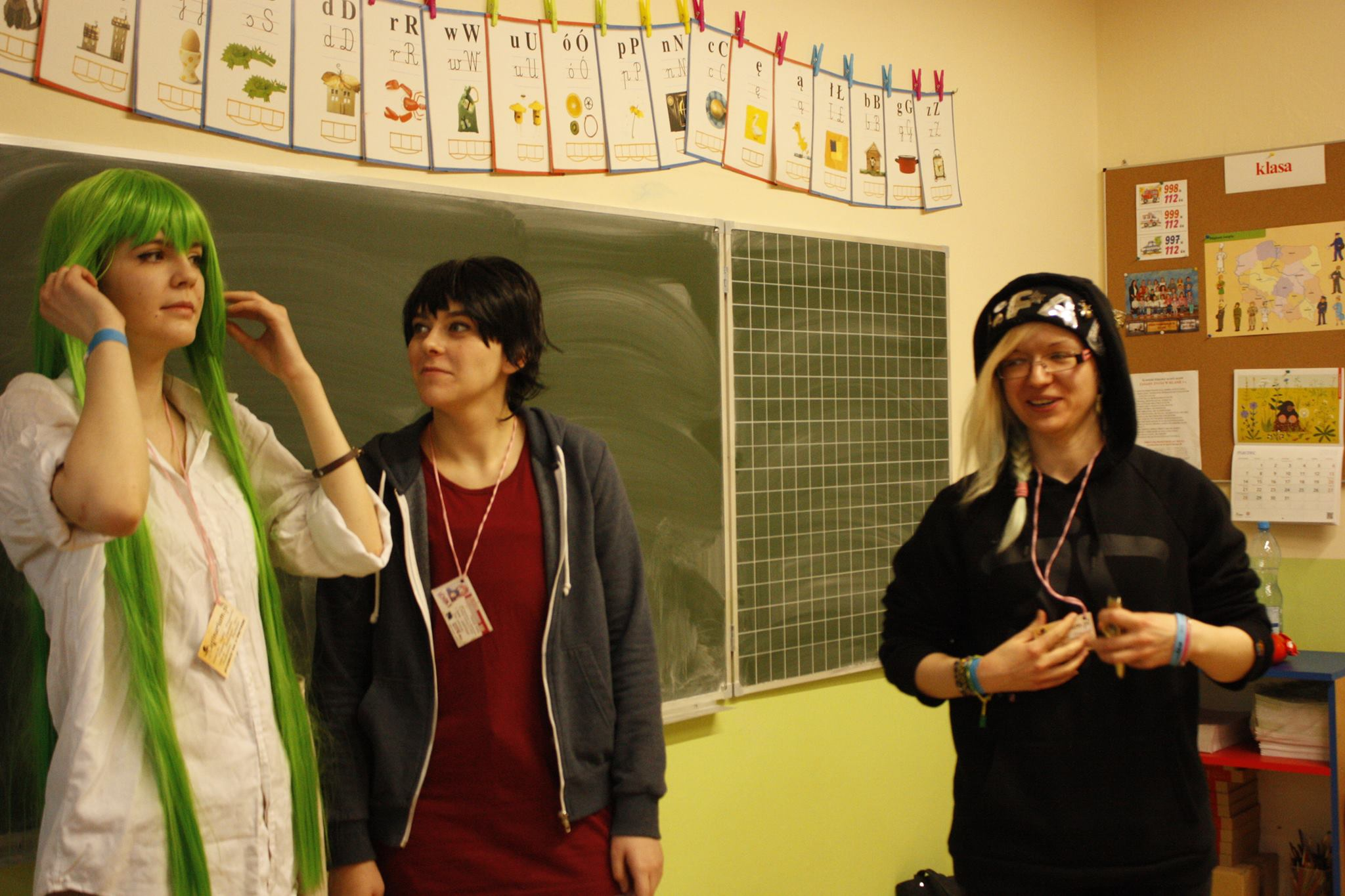 Konwent mangi i anime "Ućkon 3" zorganizowany w dniach 12-13 marca 2016 roku w Szkole Podstawowej Nr 36 przy ul. Więckowskiego 35 w Łodzi.